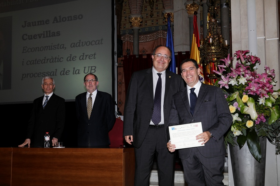 Entrega Premi Ferran Termes 2015